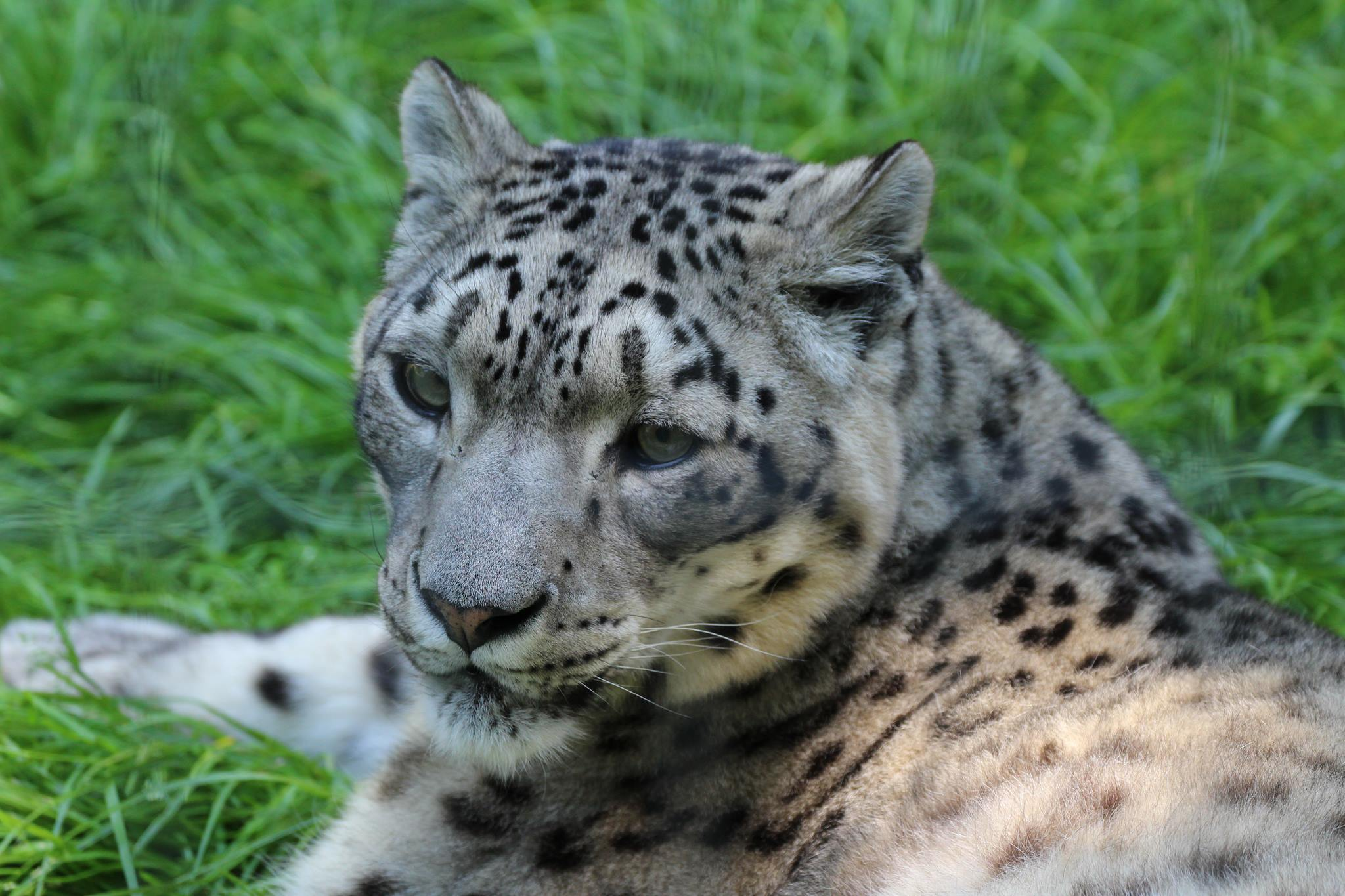 Panthère des neiges